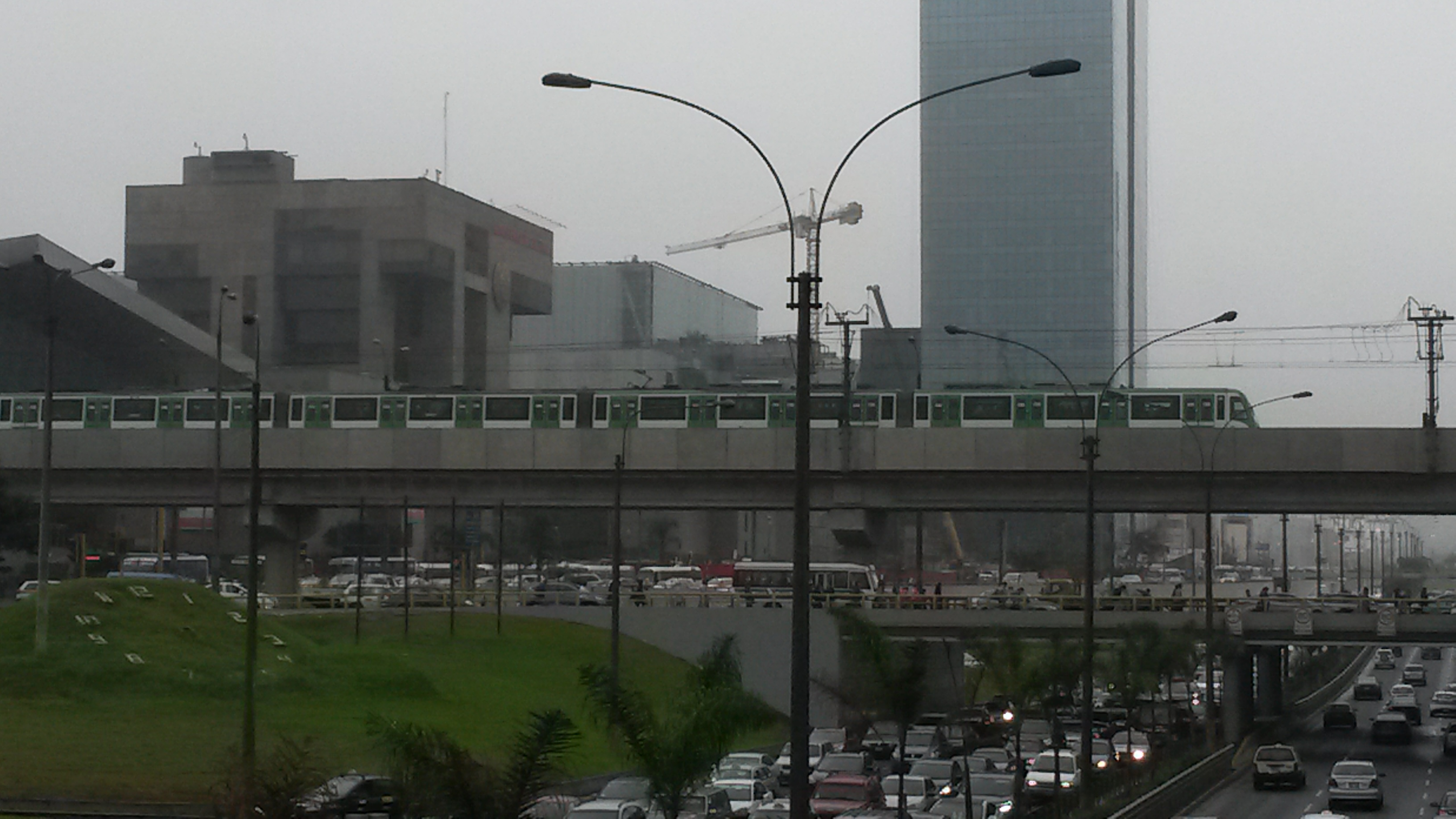 Viaducto elevado (Metro de Lima - Línea 1)